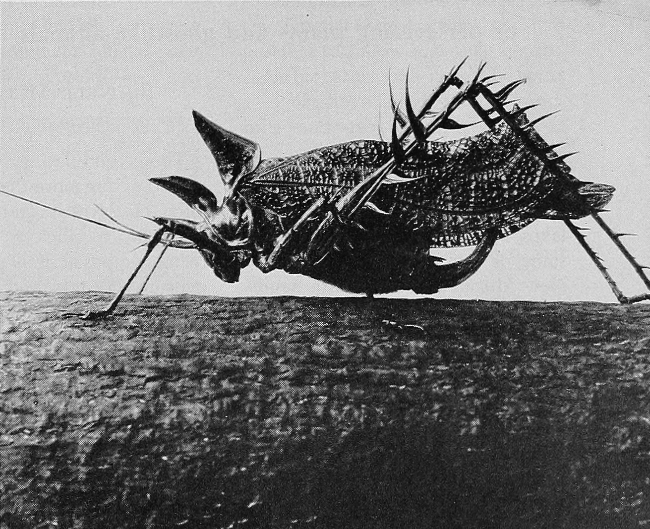 Esperança-líquen (Markia hystrix).